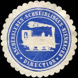 Sealing stamp Title: Aschersleben - Schneidlingen - Nienhagen - Direction Description: blau, weiß, geprägt Place: size: 5 cm